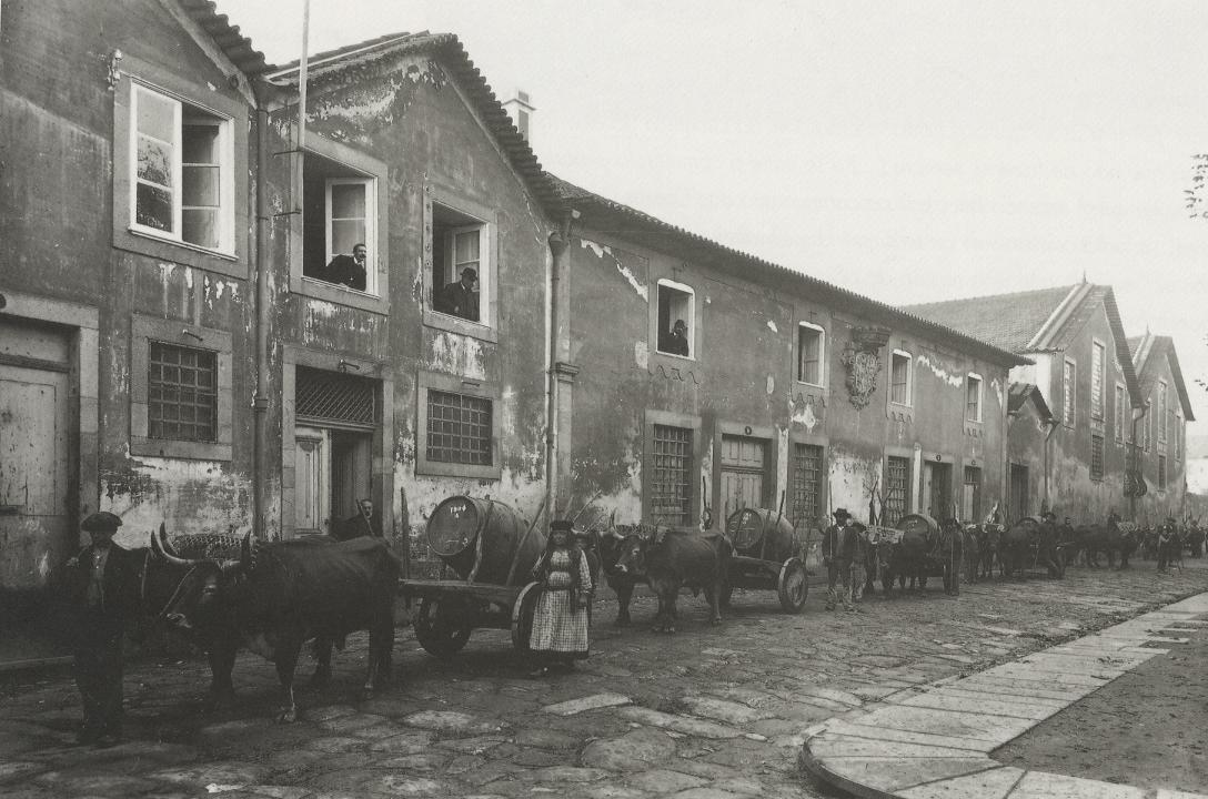 Casa dos Almadas na Rua das Sete Passadas, freguesia de Santa Marinha, Vila Nova de Gaia.